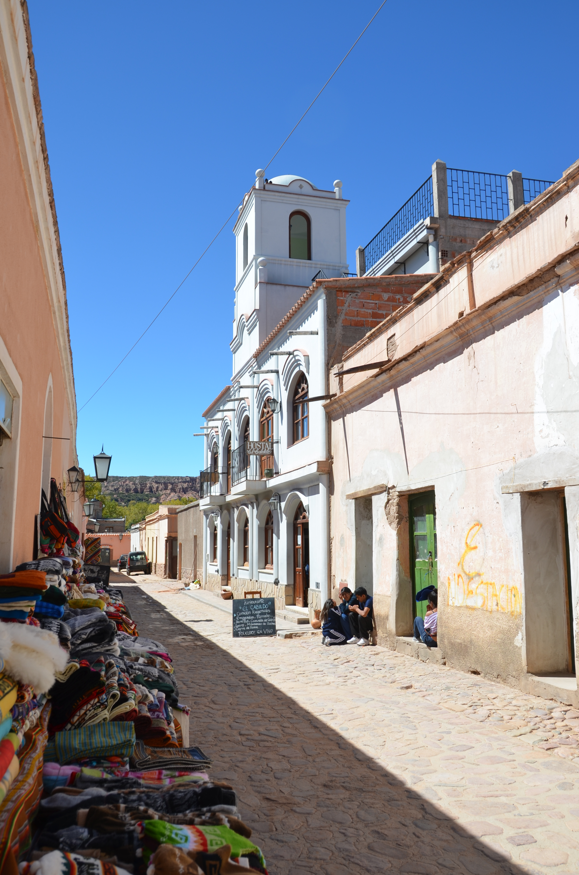 Áreas del pueblo de Humahuaca